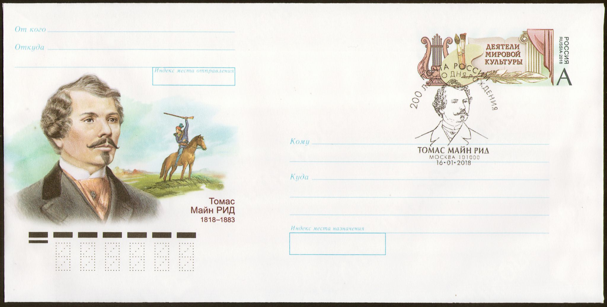 Рид Томас Майн, почтовый конверт Россия